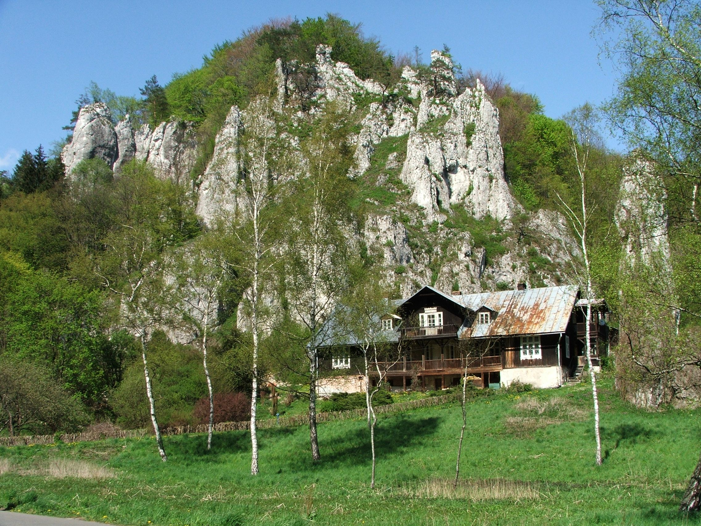 Dolina Prądnika, Skały Panieńskie, Igła Deotymy (Ojcowski Park Narodowy).